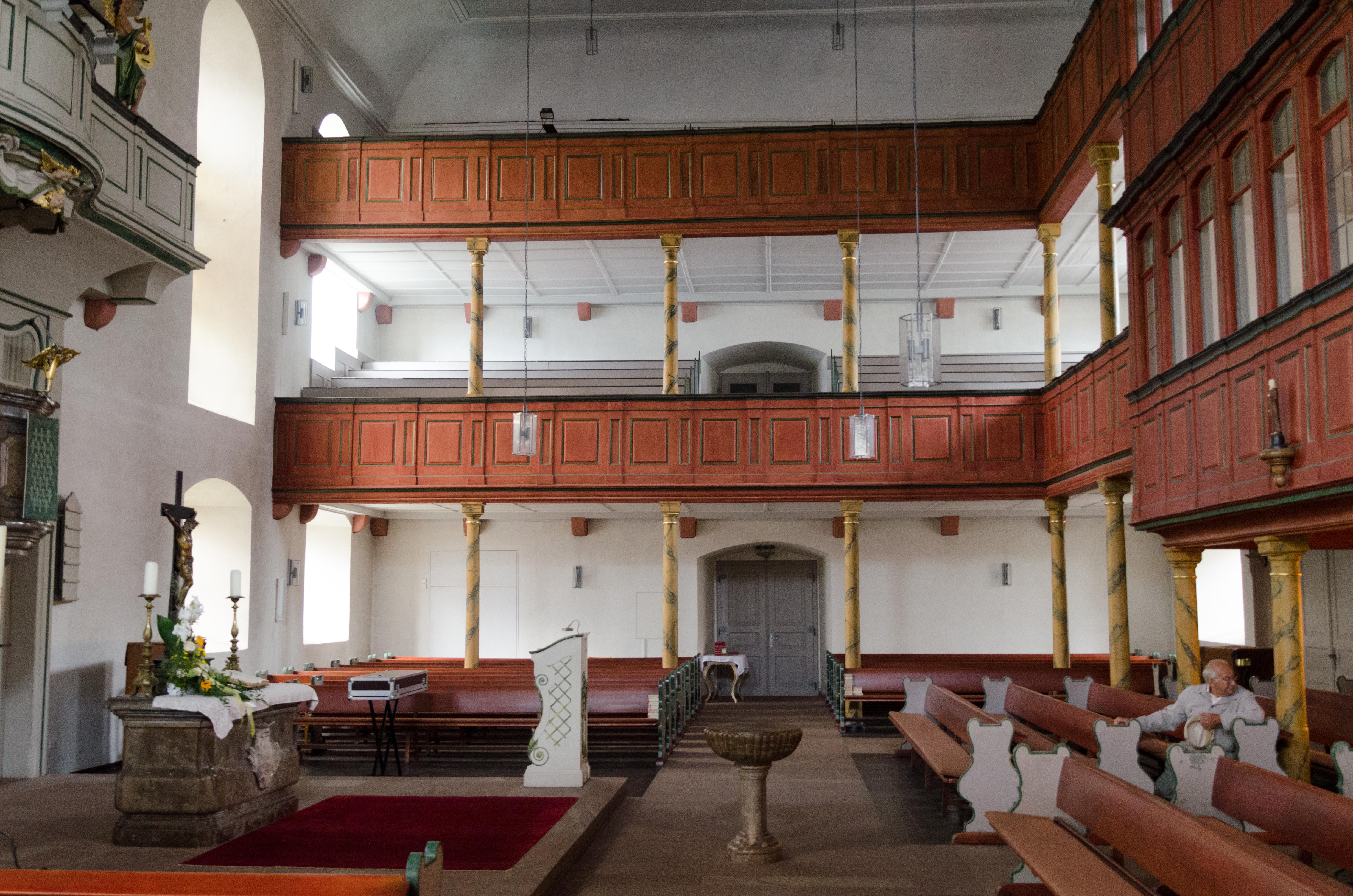 Südflügel des Kirchenschiffs der Evangelischen Stadtkirche in Erbach (Odenwald) mit doppelgeschossiger Empore, Altar (links) und Taufstein (mitte)